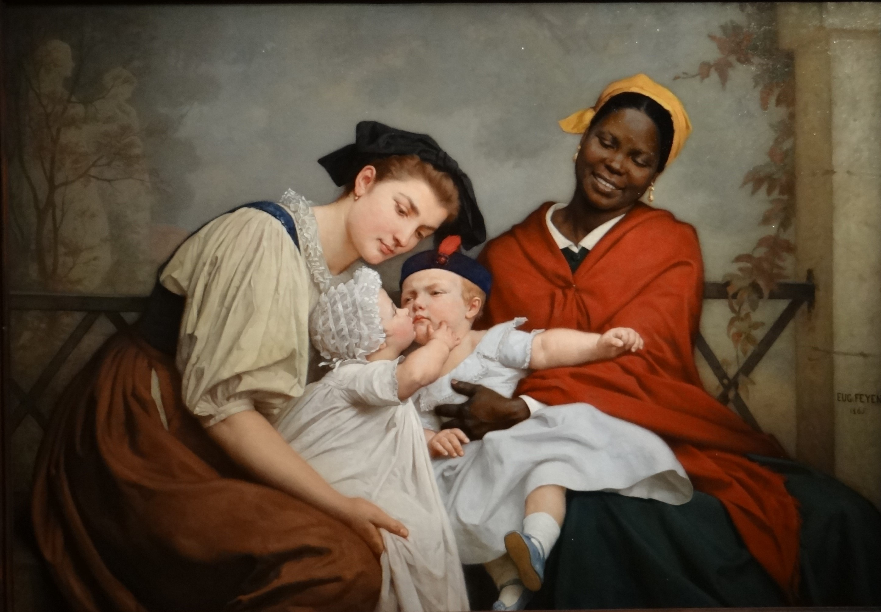 Jacques Eugène Feyen, Le Baiser enfantin, Salon de 1865, huile sur toile. Lille, palais des beaux-arts.